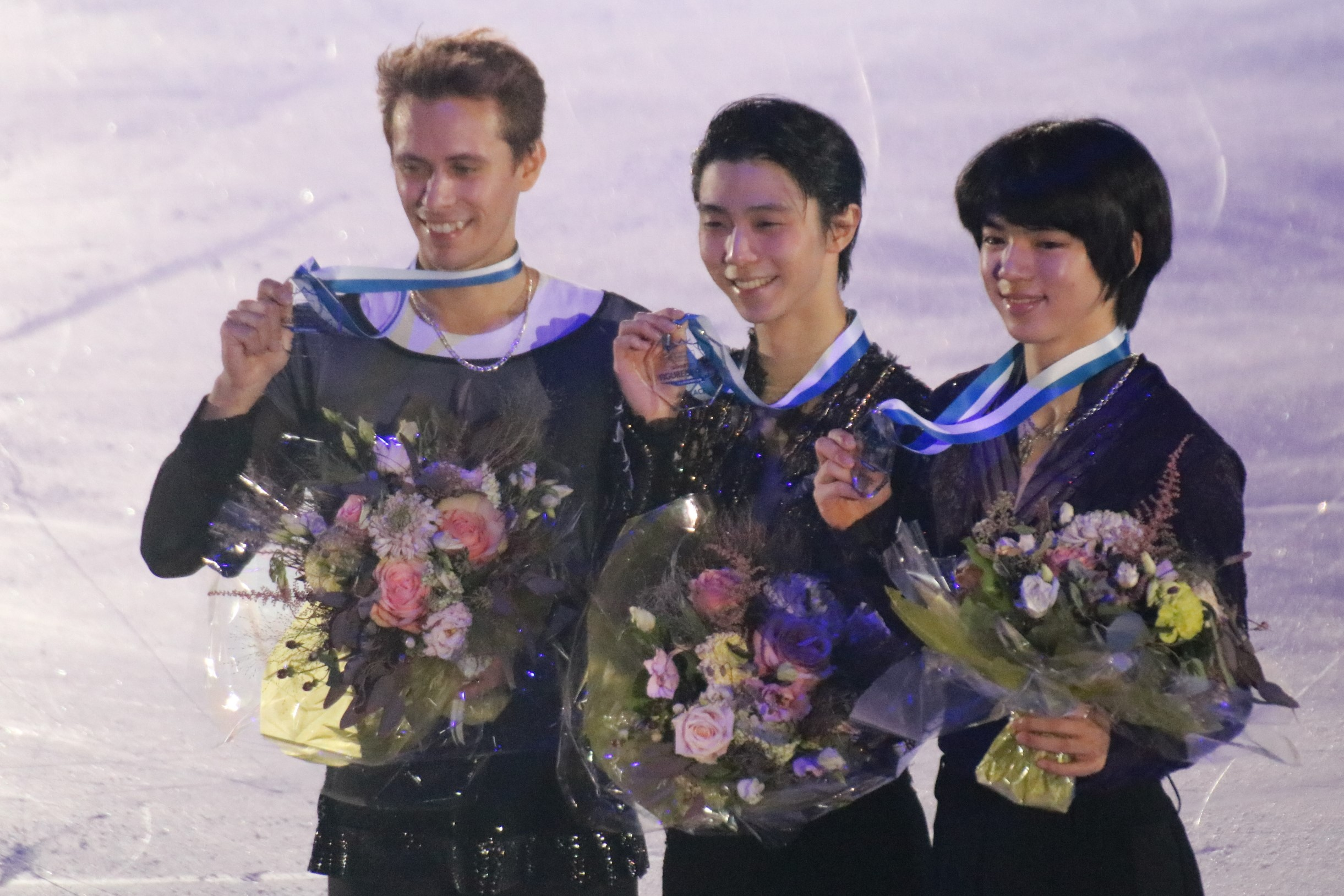 Церемония награждения в мужском одиночном катании на Гран-при Хельсинки 2018.